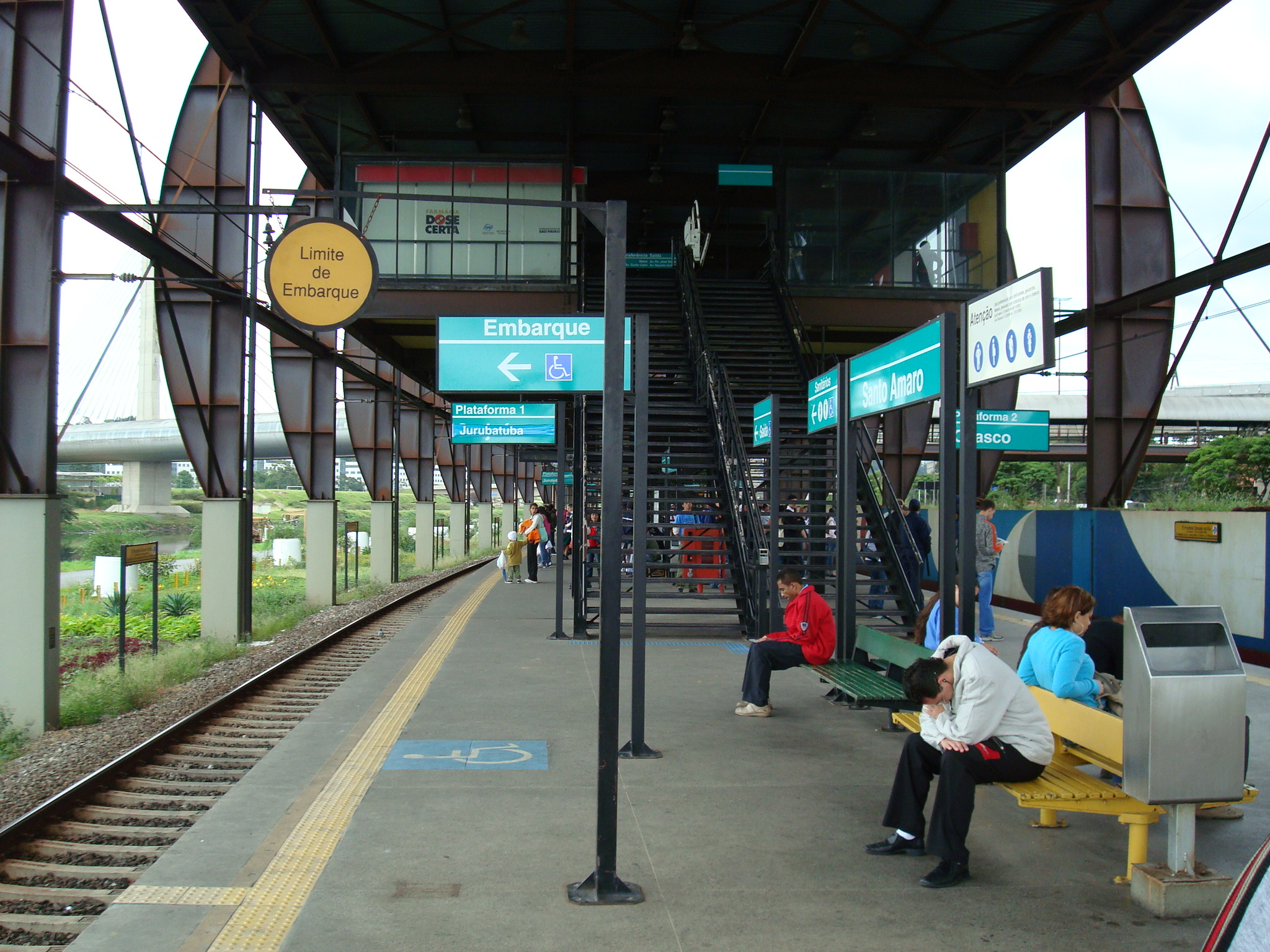 Estação Santo Amaro da Linha 9 (Esmeralda) operada pela [Companhia Paulista de Trens Metropolitanos]. Integração com a Linha 5 (Lilás) operada pelo [Metrô de São Paulo].